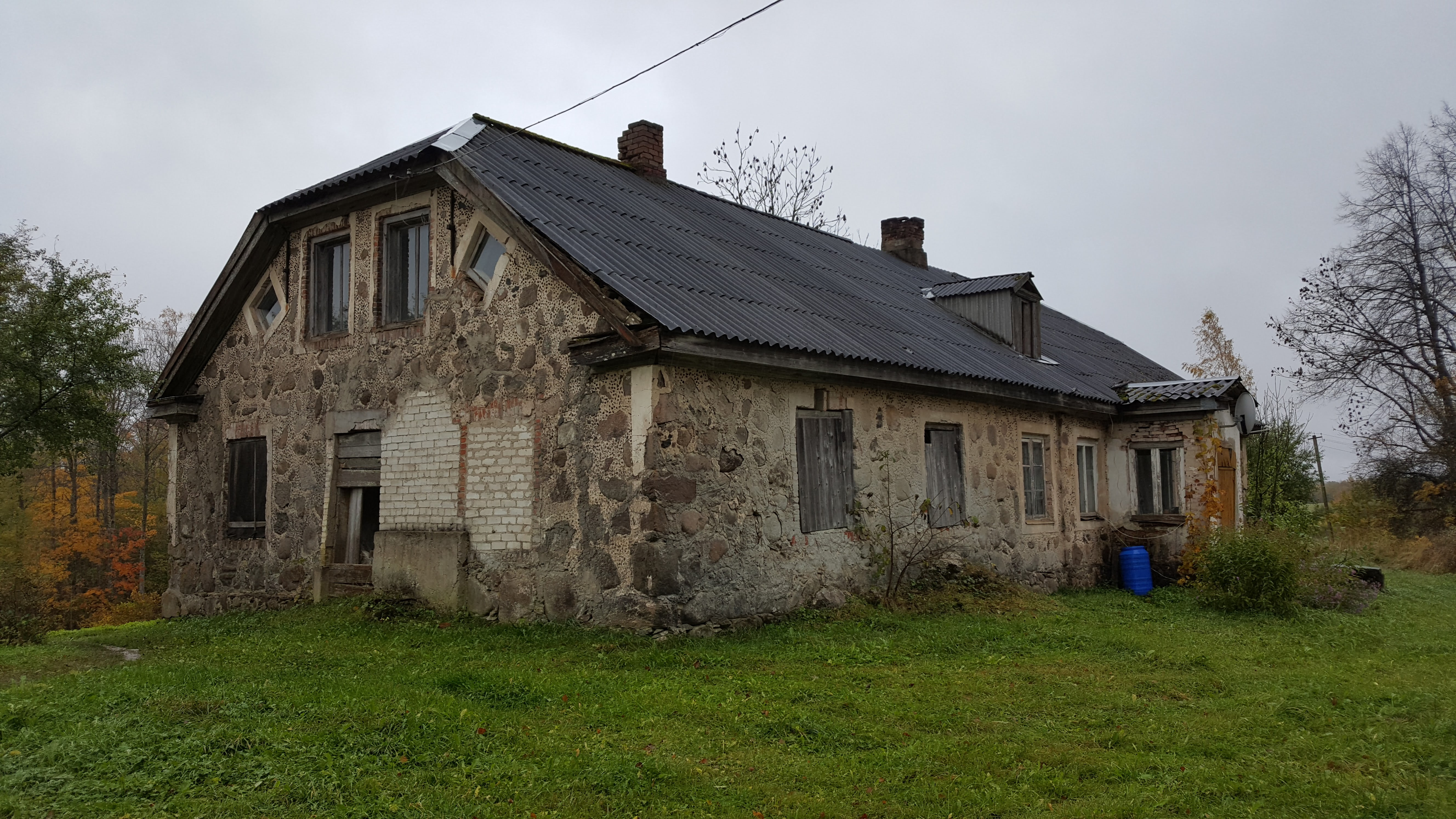 Eži mõisa peahoone 2017. aastal.